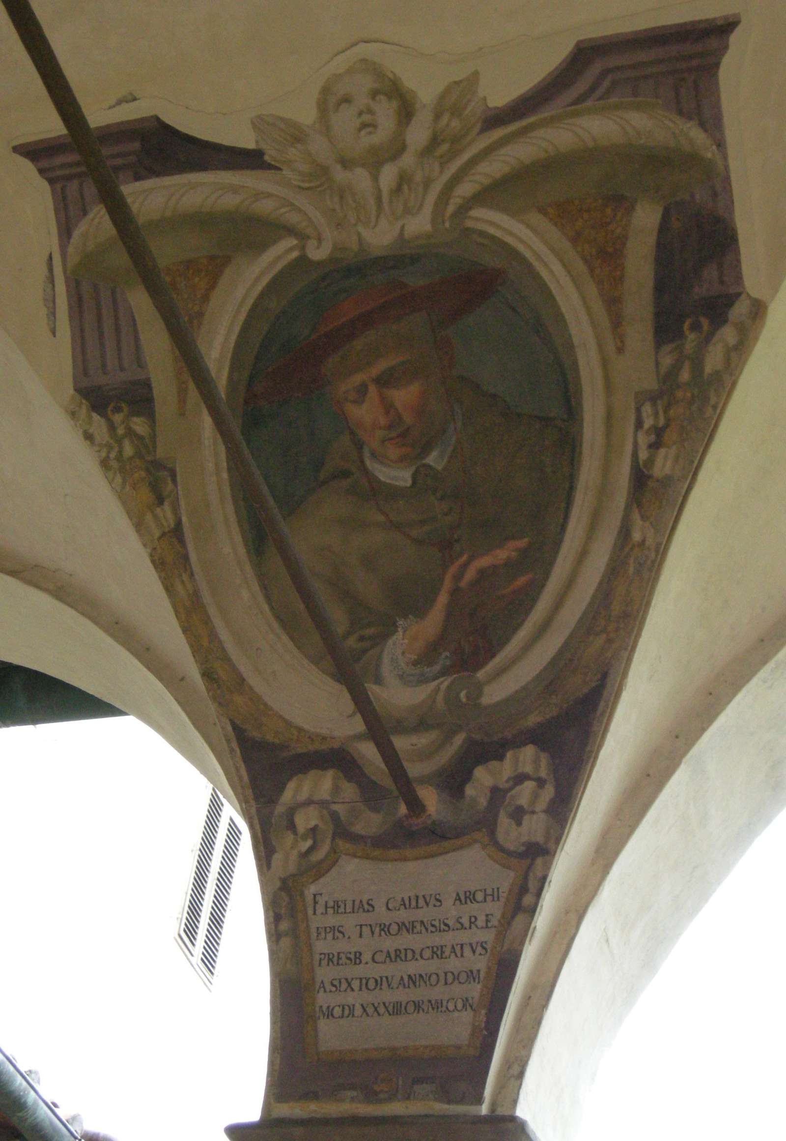 Chiostro di ognissanti, personalità francescane 40 Hélie de Bourdeilles